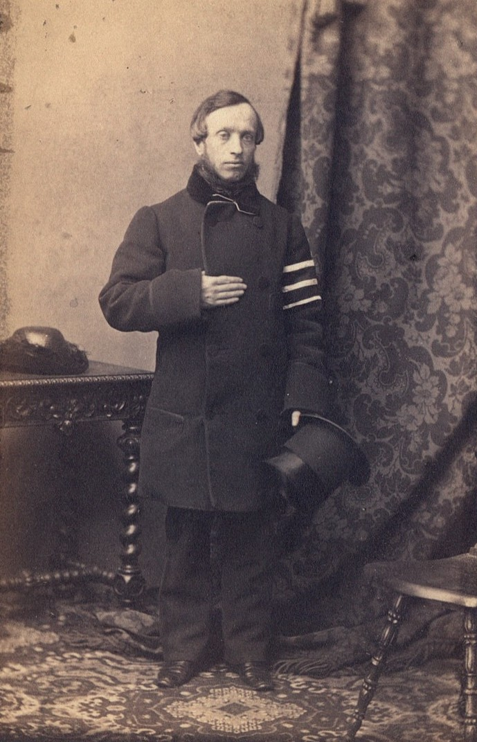 Portret Augusta Trzetrzewińskiego, 1861 r.